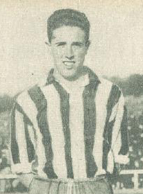 Luis Olaso en 1927